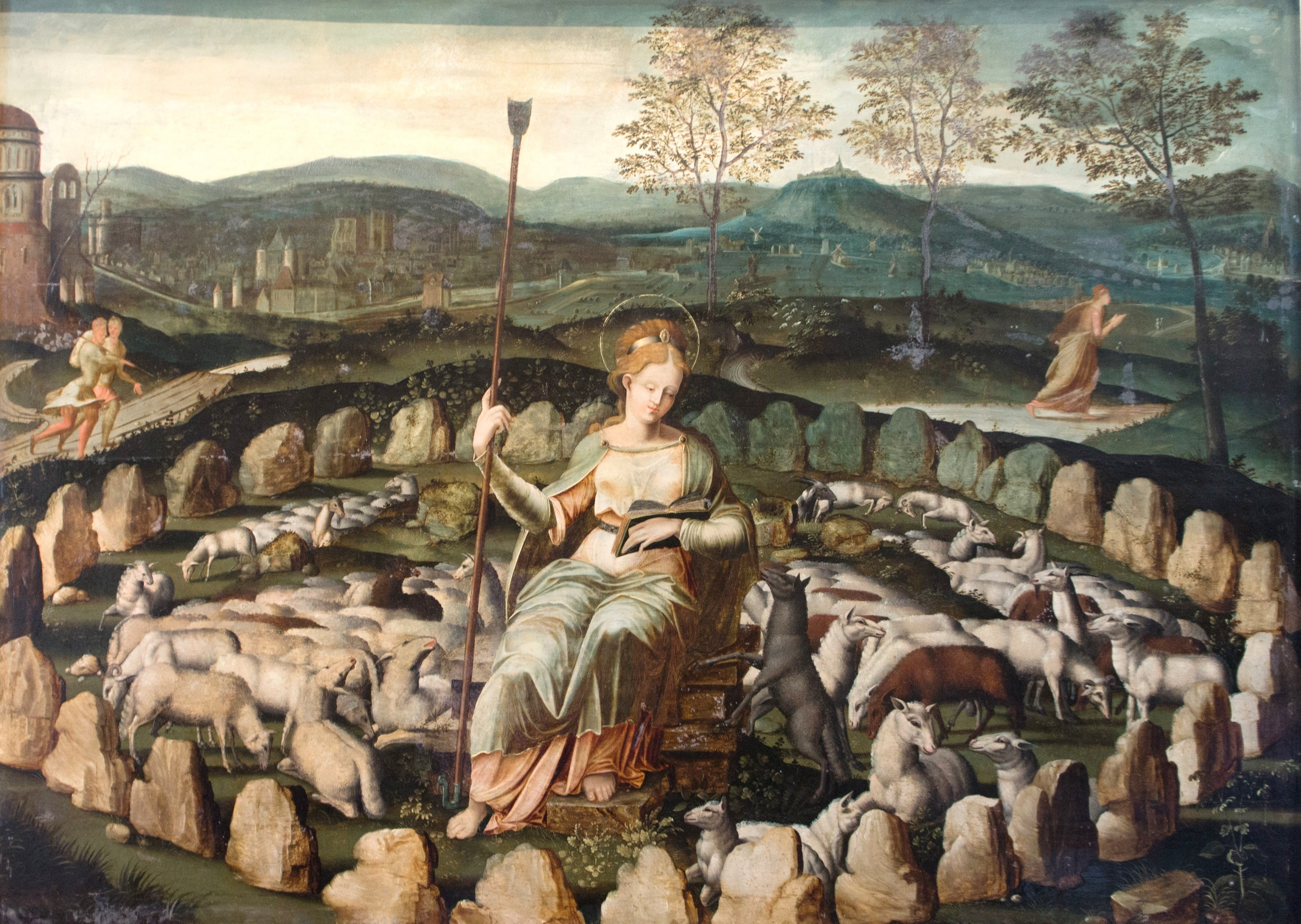 Sainte Geneviève entre Paris et Saint-Denis, tableau du Musée Carnavallet.